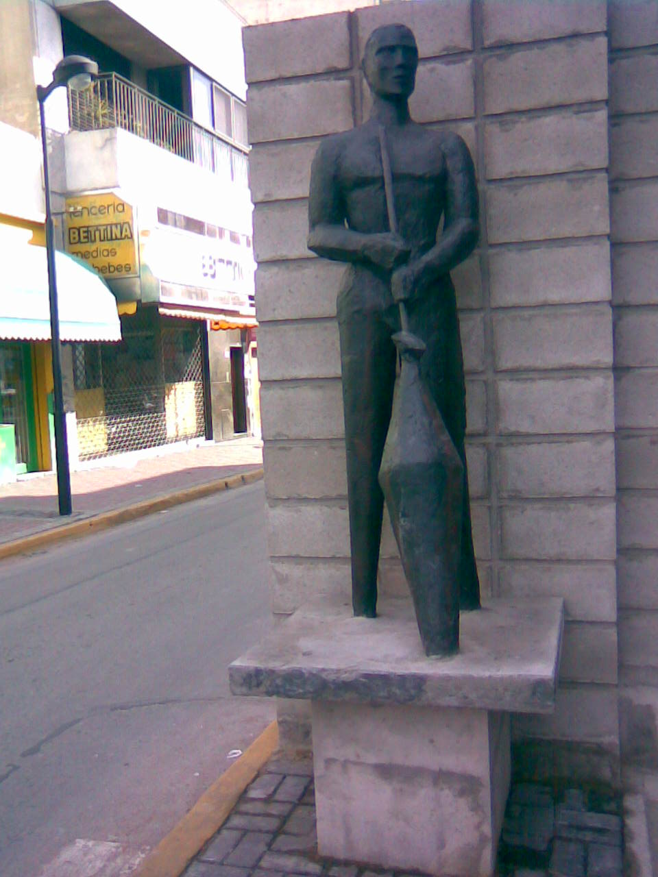 Monumento al Trabajador del Vidrio. Calles 148 y 13, Berazategui.